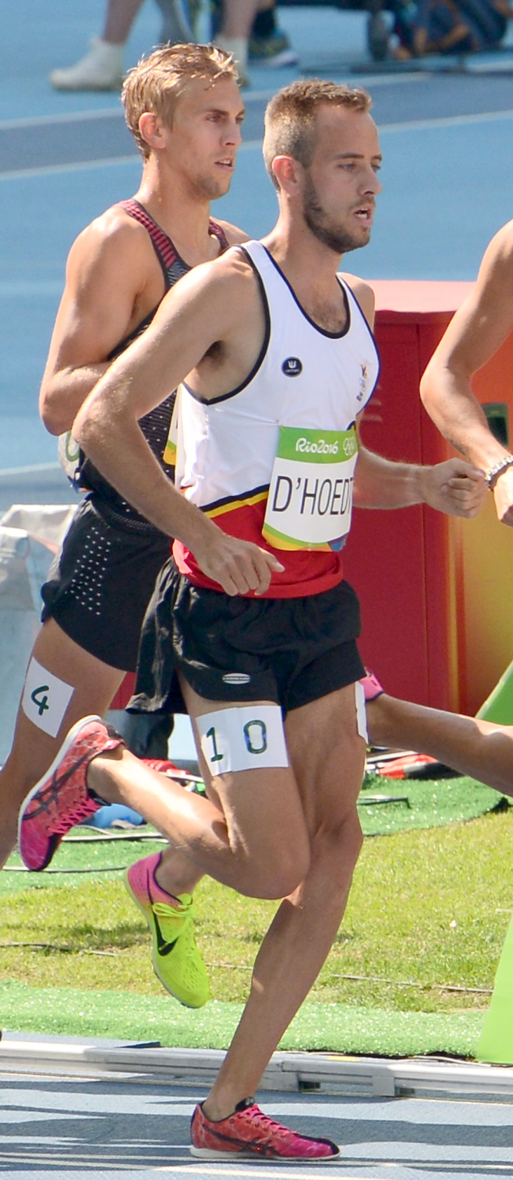 Série du 3000m steeple Homme des JO de Rio, 2016